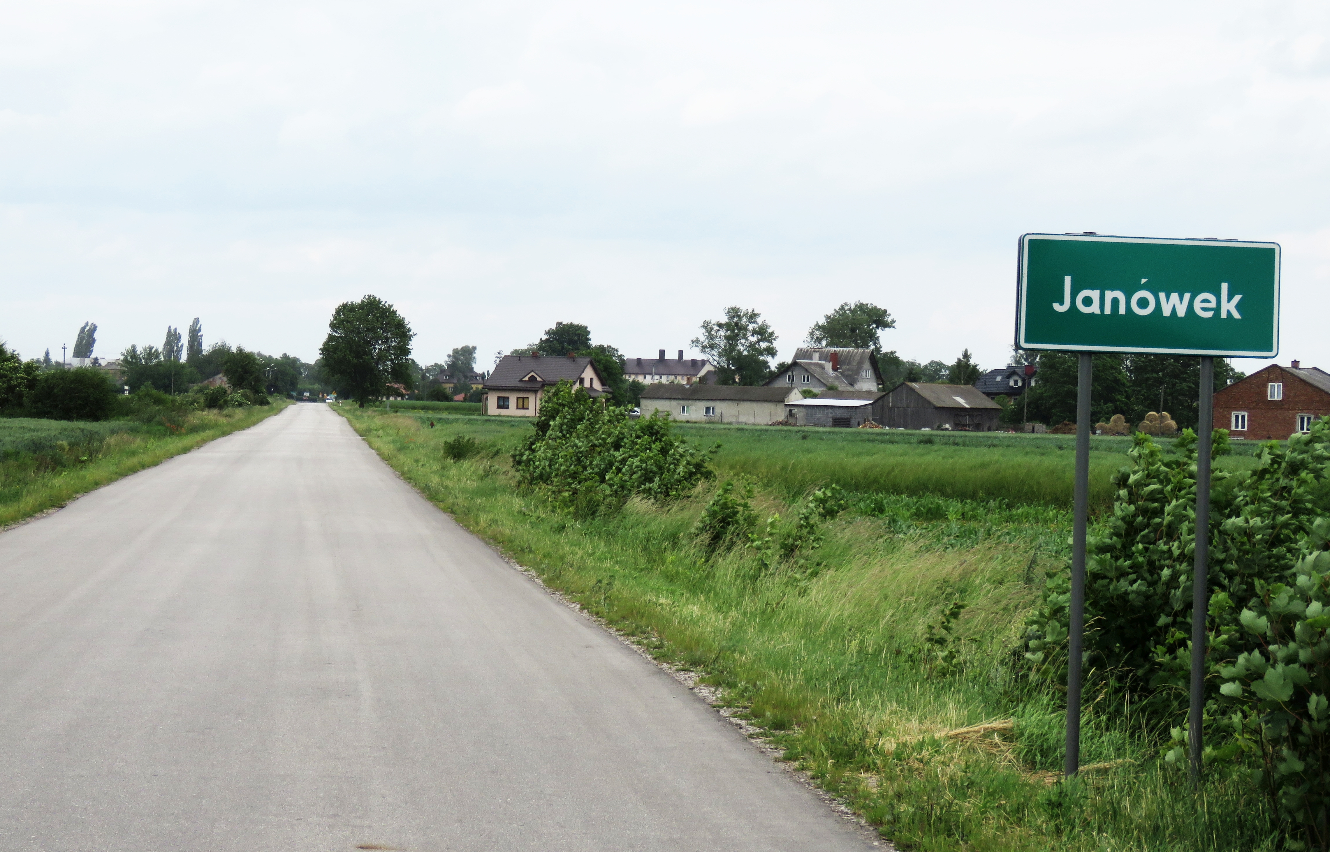 Janówek, gmina Wiskitki